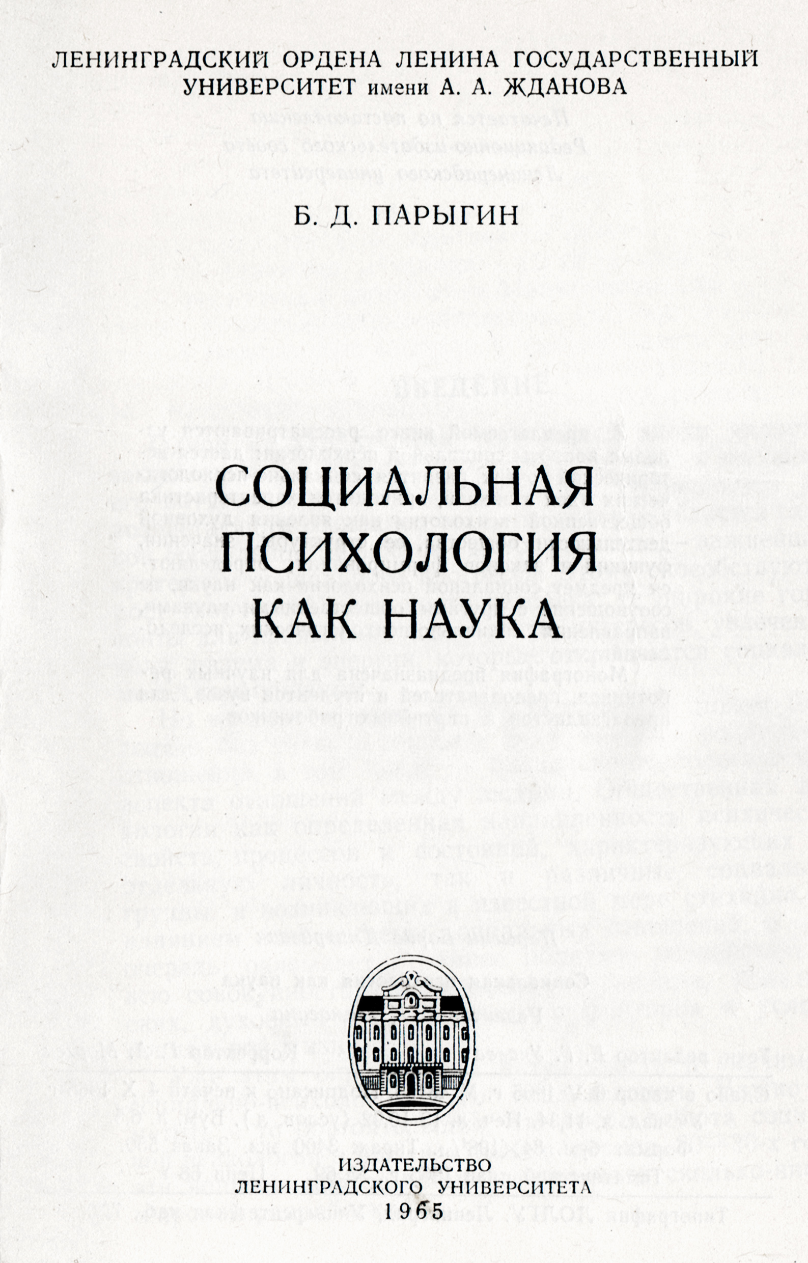 Титульный лист монографии Б.Д. Парыгина "Социальная психология как наука"